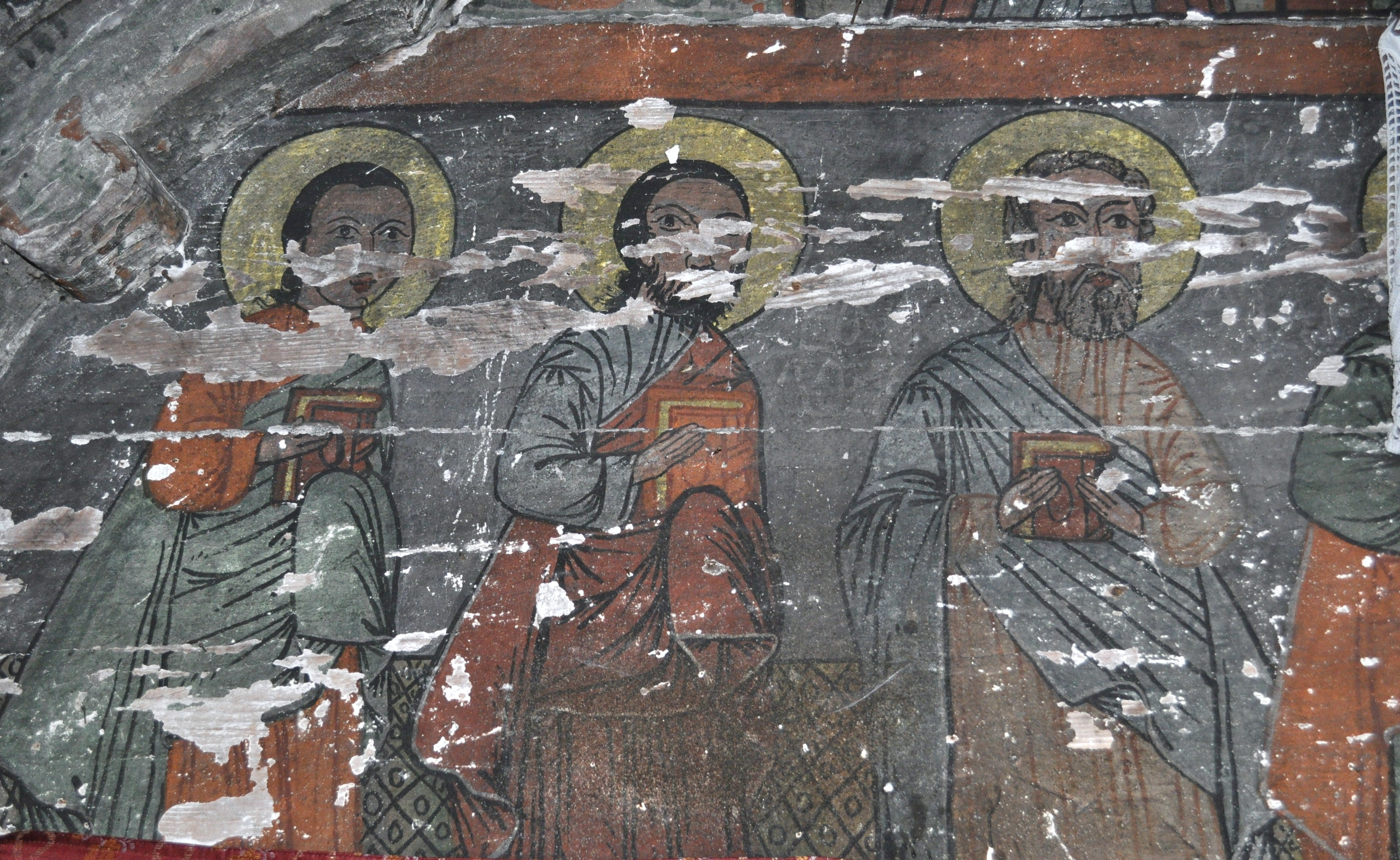 Biserica de lemn din Stolna, județul Cluj